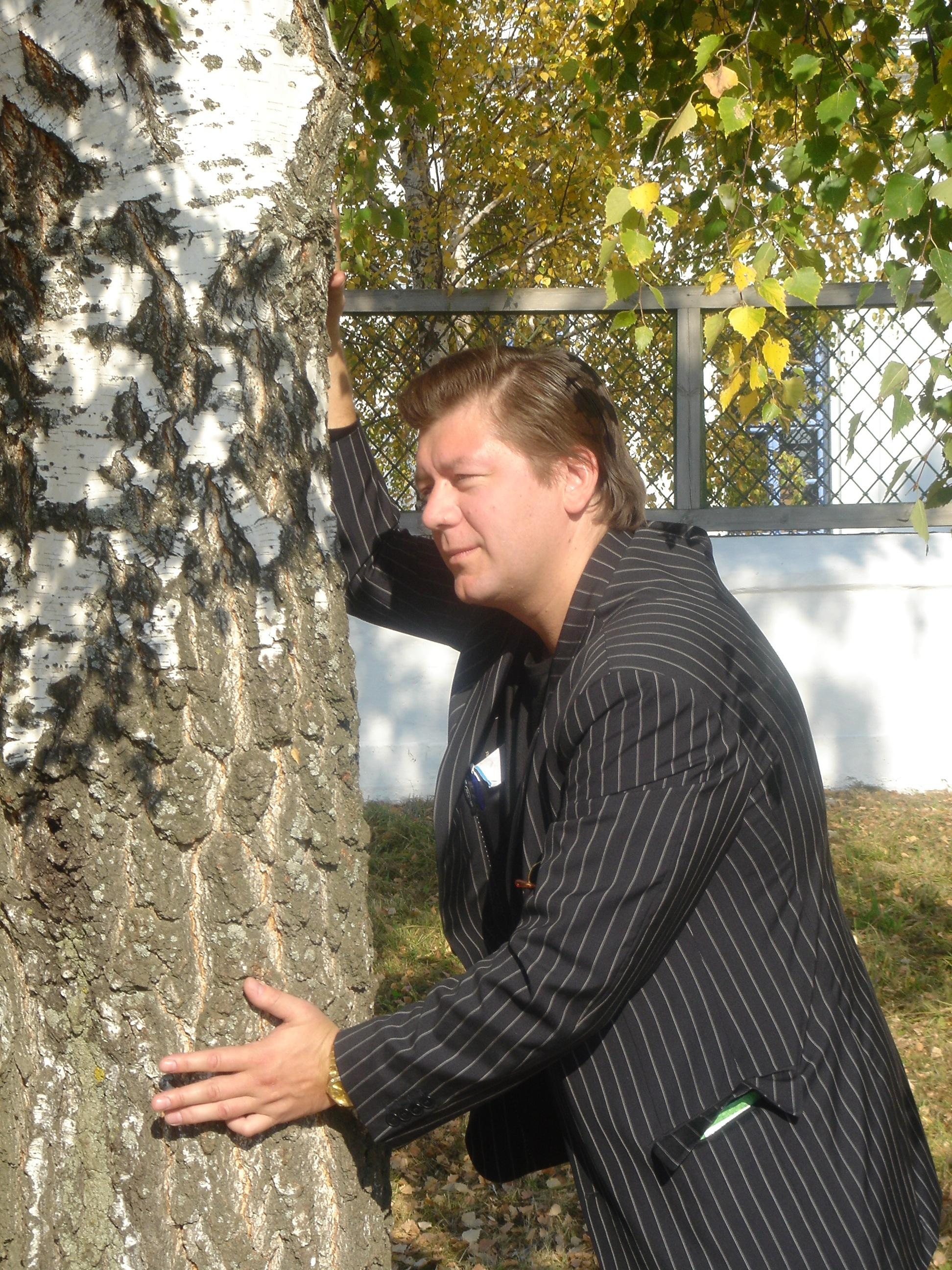 Дмитрий Дарин в Константиново